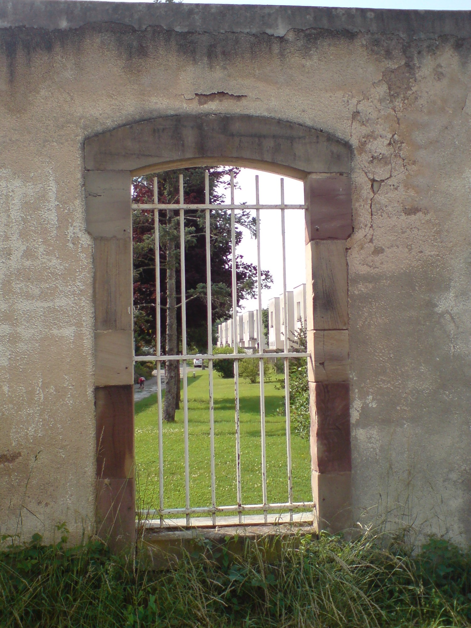 Ceci est un mur d'enceinte des anciennes casernes.